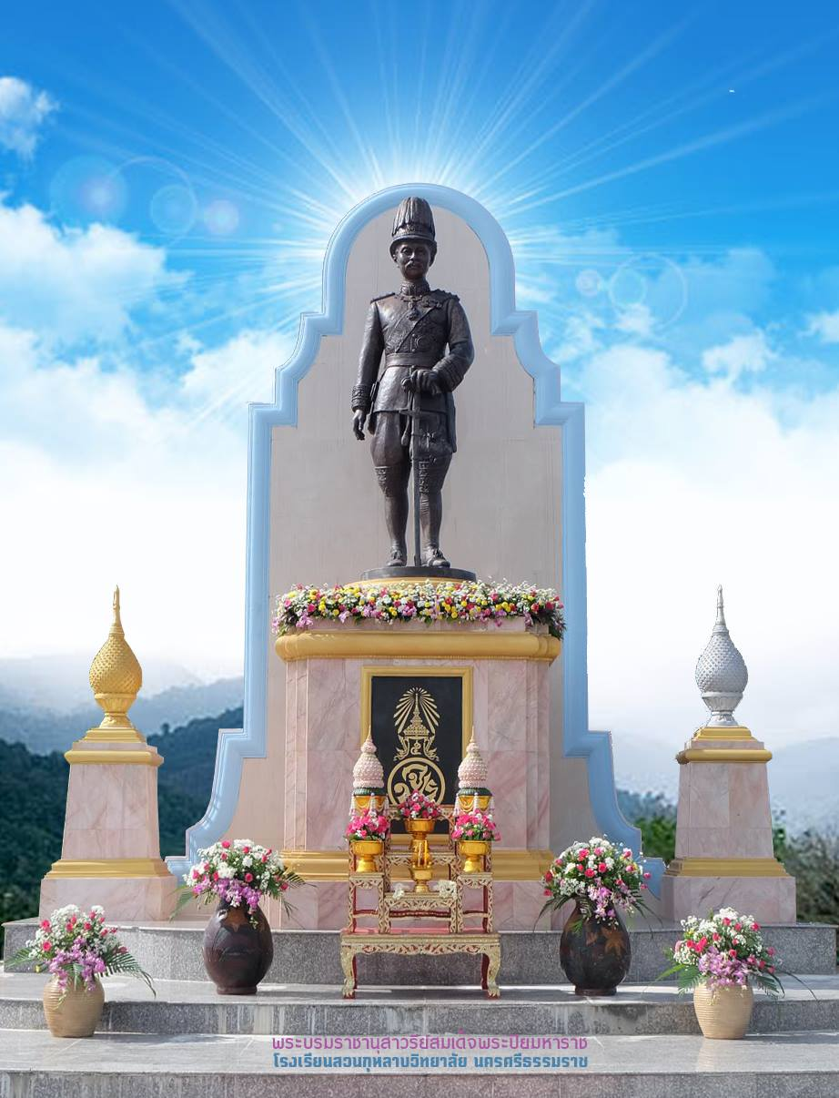 พระบรมราชานุสาวรีย์ พระบาทสมเด็จพระจุลจอมเกล้าเจ้าอยู่หัวฯ รัชกาลที่ ๕ ประดิษฐานอยู่ ณ สนามโรงเรียนสวนกุหลาบวิทยาลัย นครศรีธรรมราช